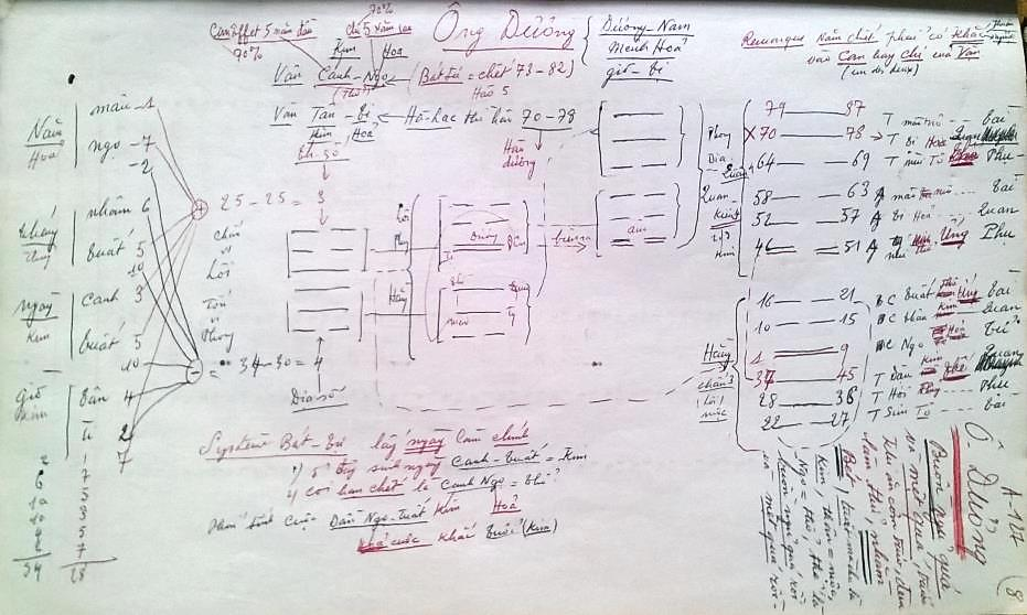 HLDuong